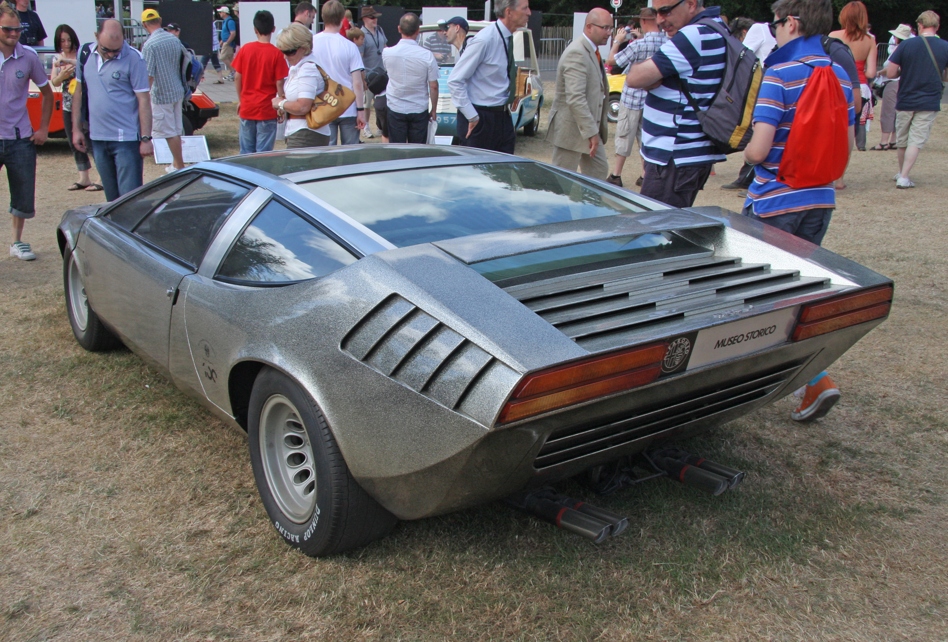 Alfa Romeo Iguana